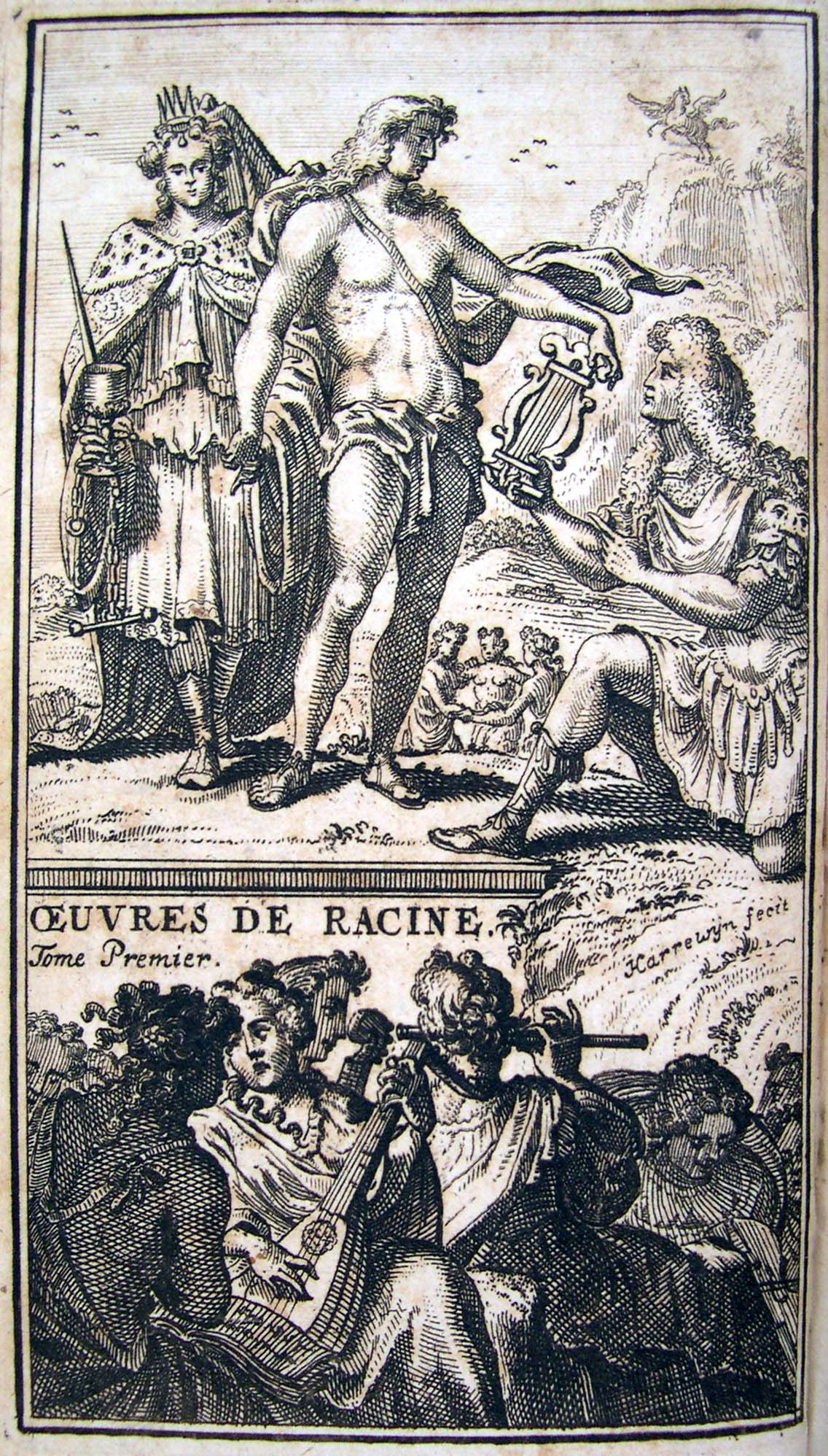 Oeuvres de Racine, Bruxelles 1700, vol. I